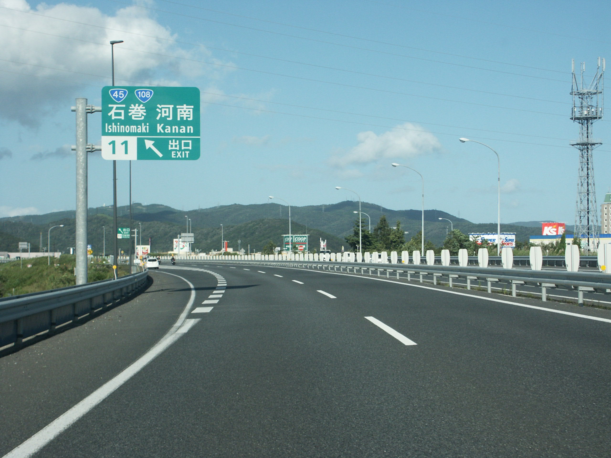 三陸自動車道石巻河南IC 出口付近（利府JCT方面側）